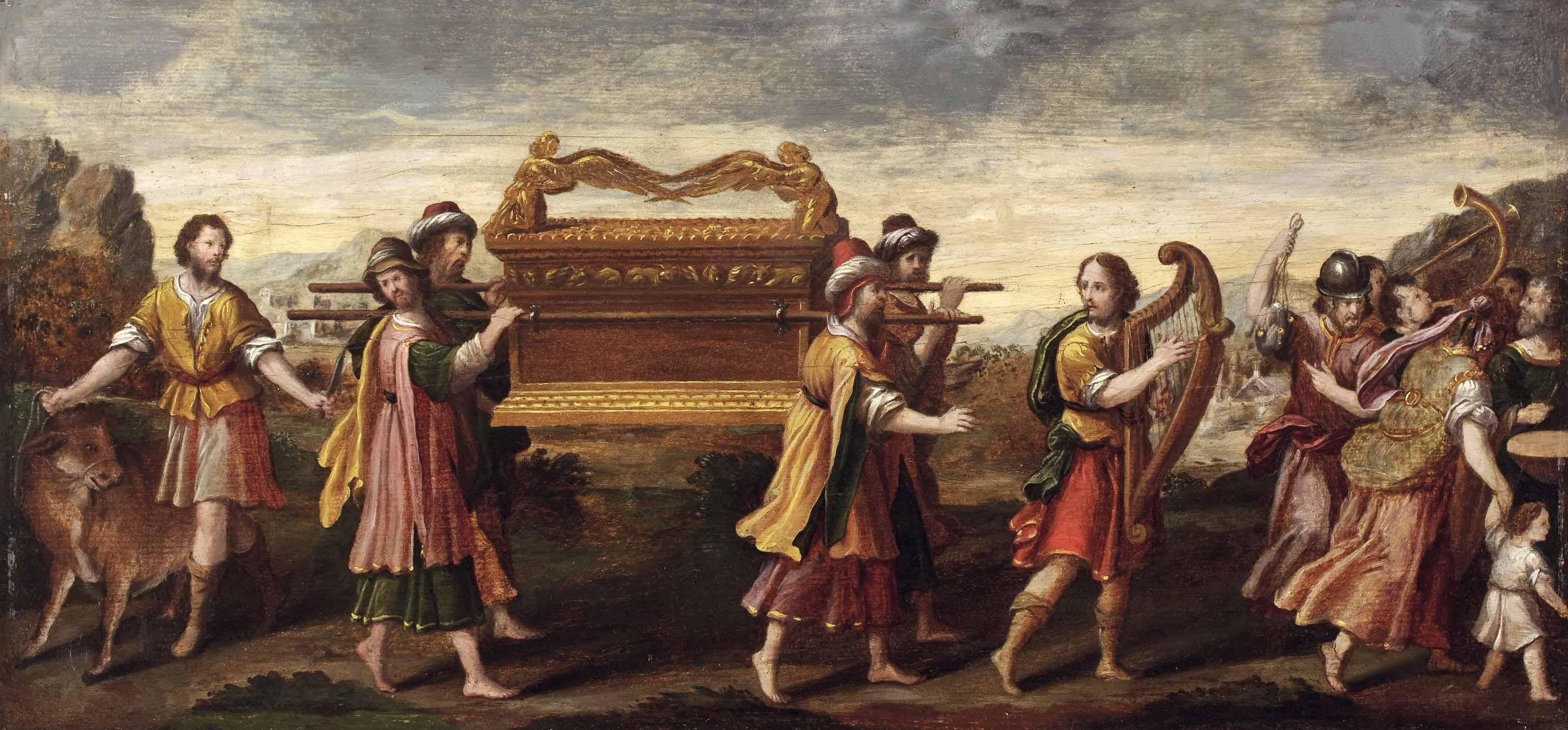 "Die Überführung der Bundeslade durch den singenden und tanzenden König David (2 Sam. 6). Italo-Flämische Schule um 1600, Öl auf Holztafel, ca. 38 x 81 cm (Klappdeckel eines Cembalos)